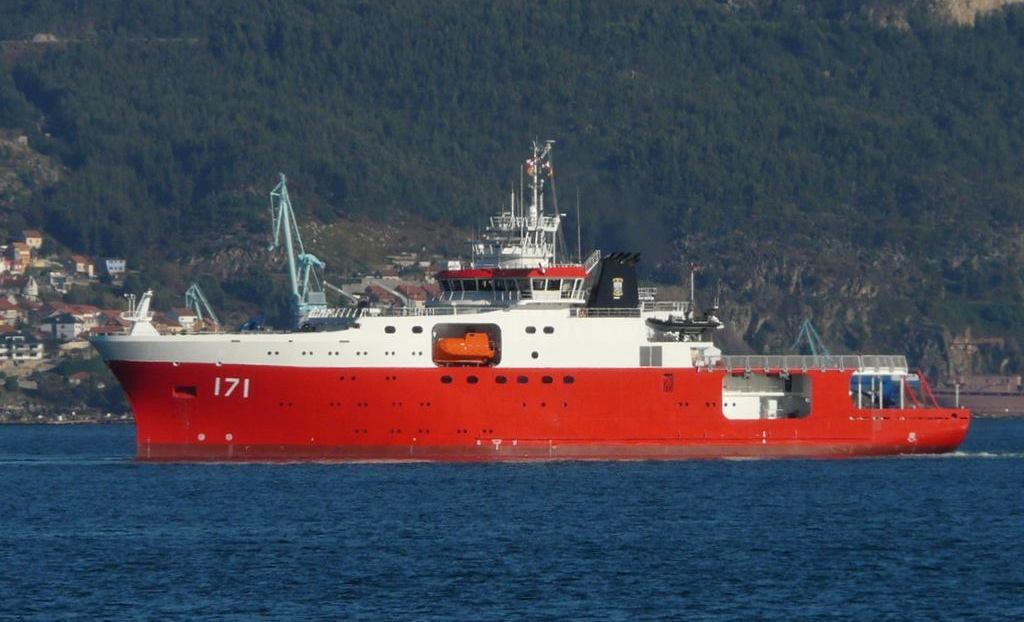 BAP Carrasco (BOP-171) frente a Vigo (España).